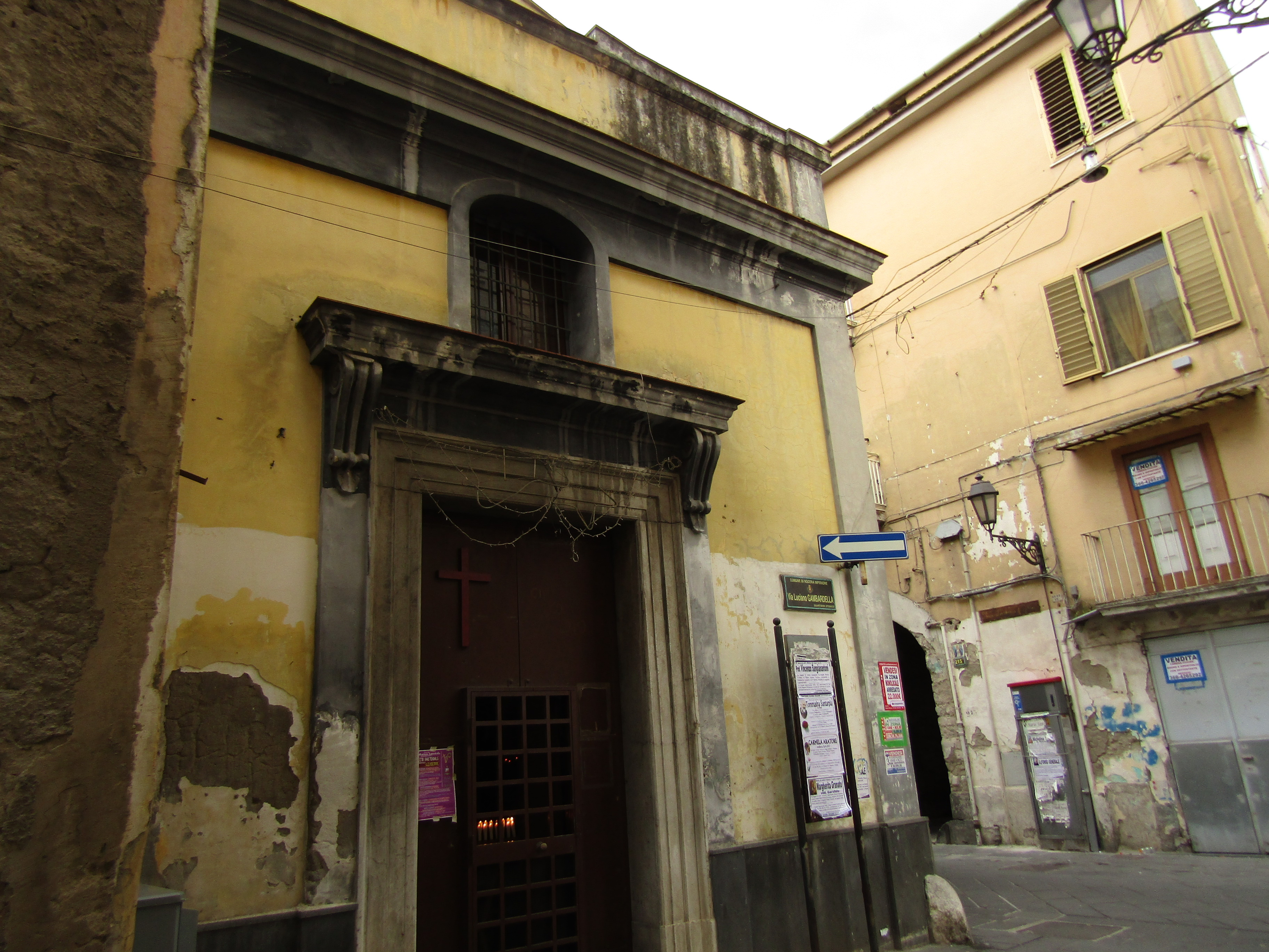 Template:Informazioni file